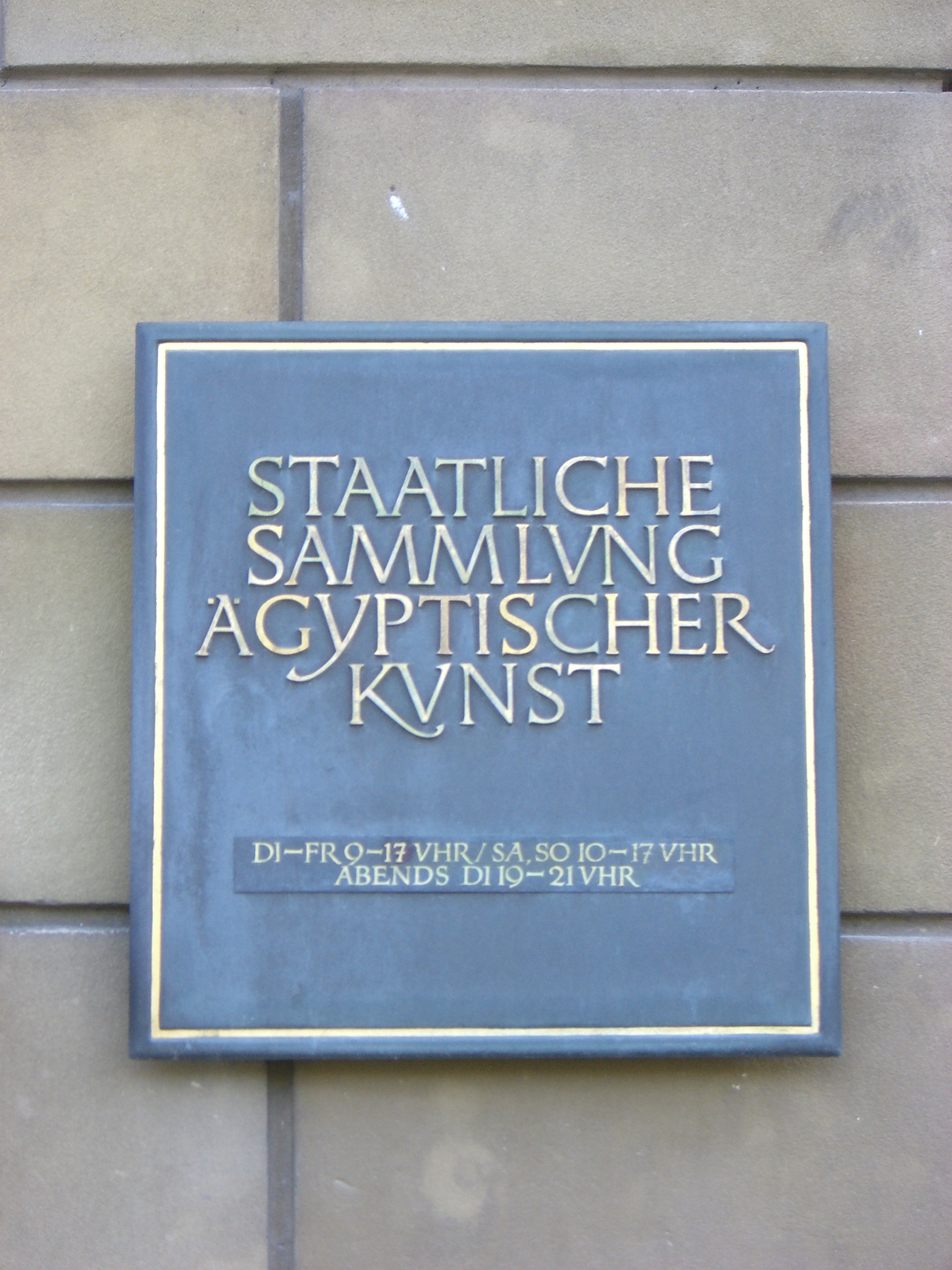 München - Staatliches Museum Ägyptischer Kunst (Schild)